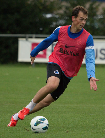 Tom De Sutter, aanvaller van Club Brugge